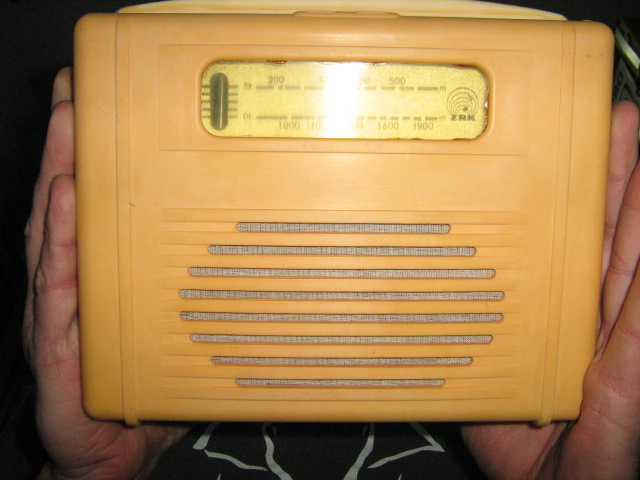 Radioodbiornik Szarotka tranzystorowo lampowa